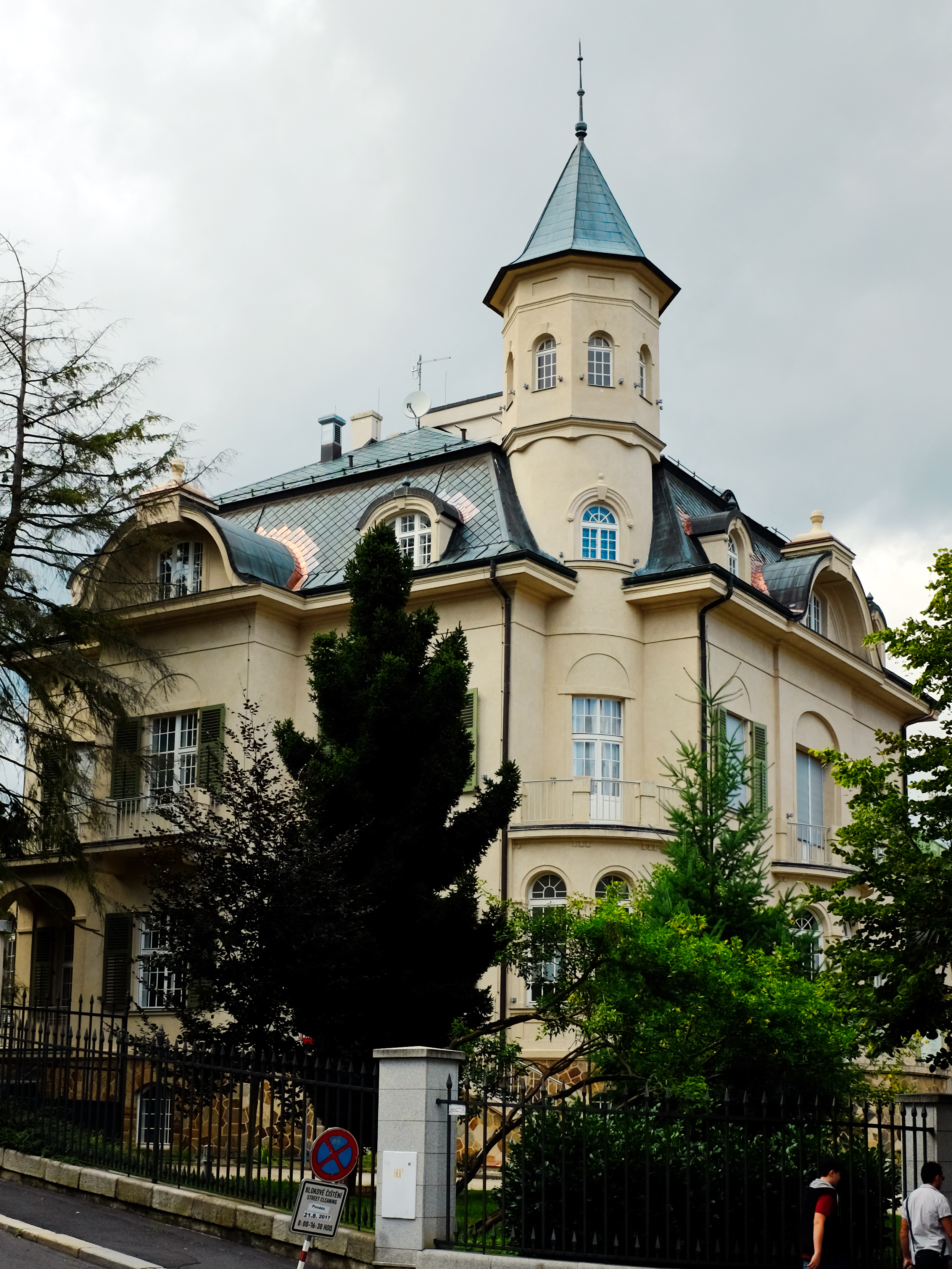 Vila Becher, třída Krále Jiřího 1196/9, Karlovy Vary.